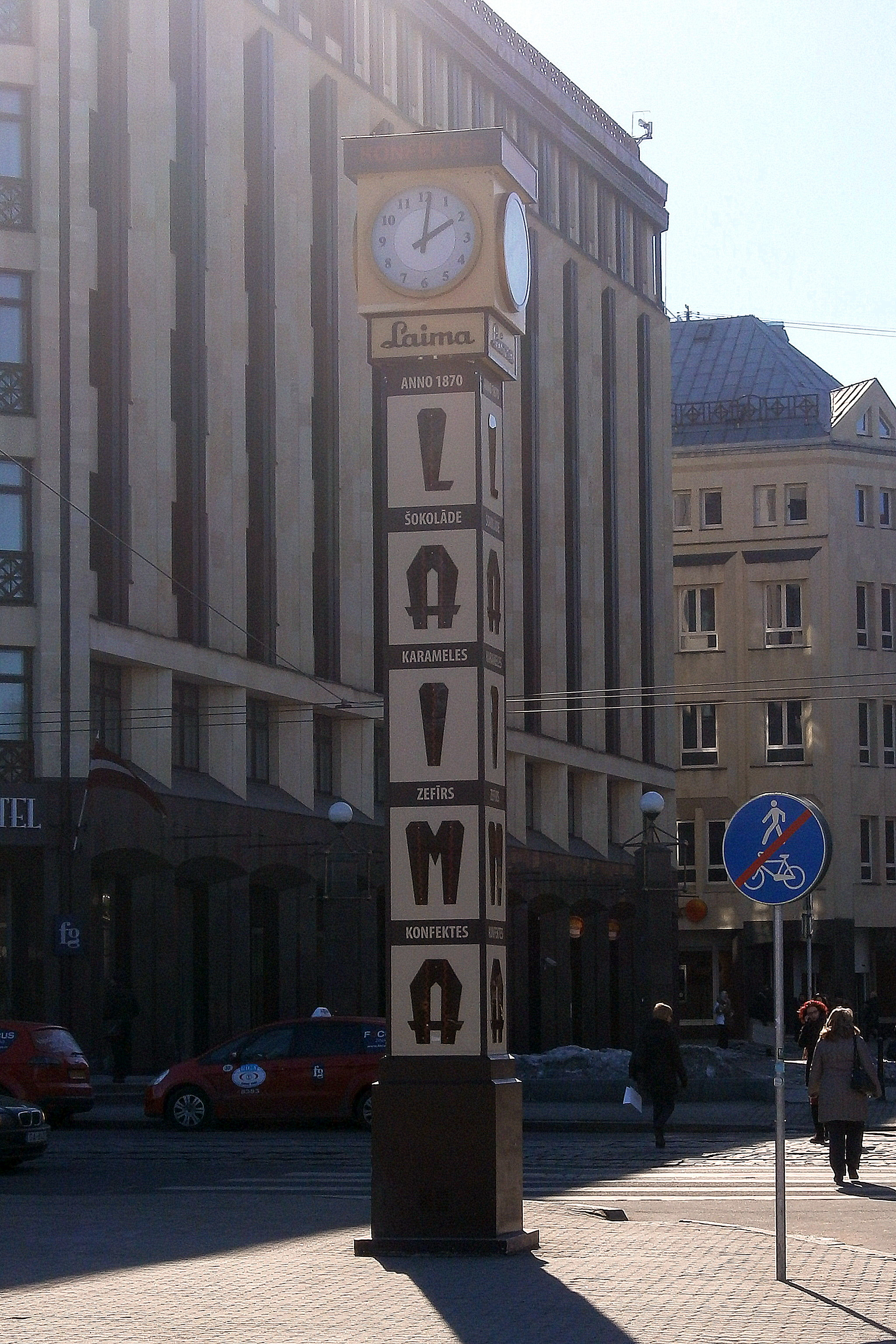 Laimas pulkstenis